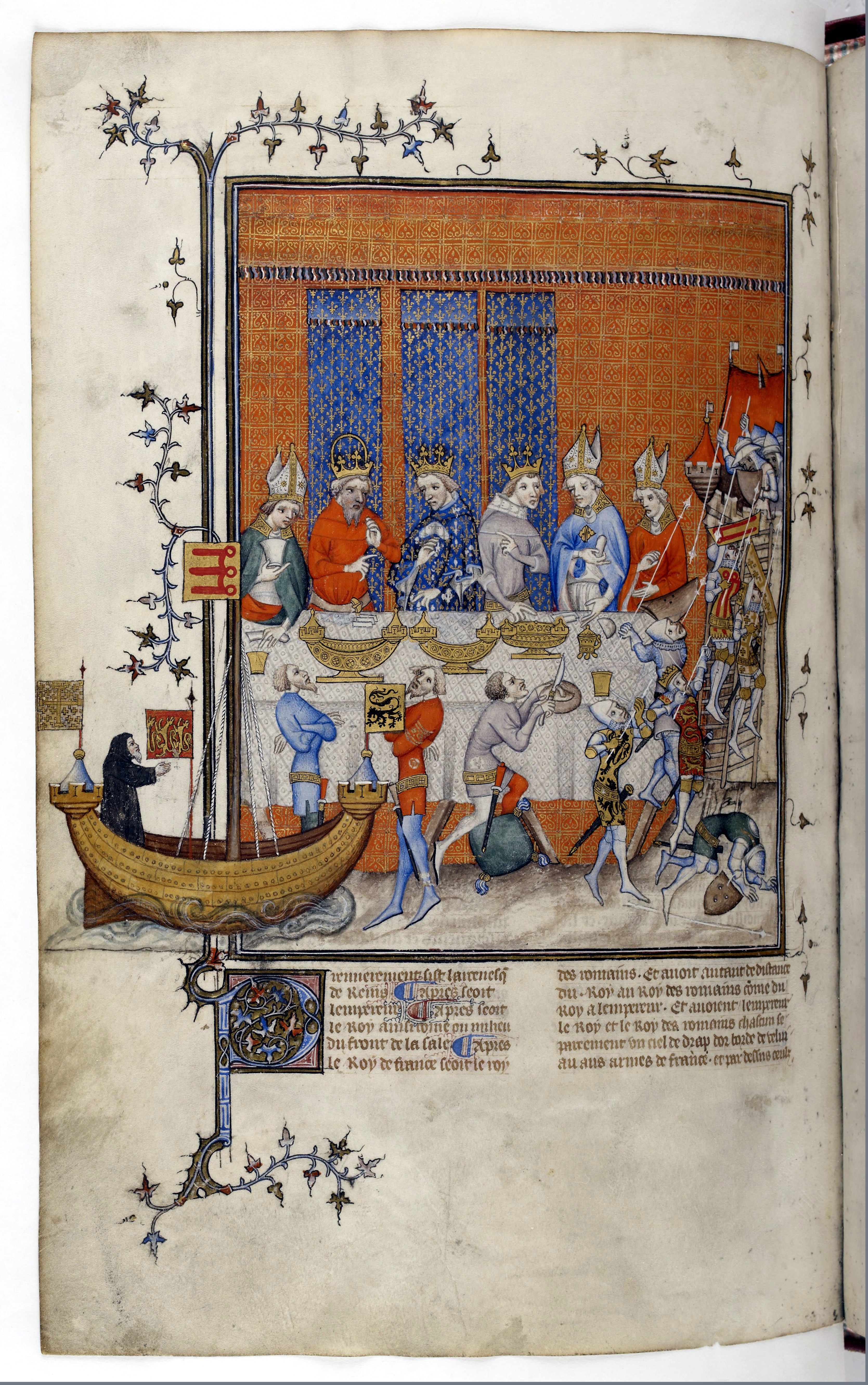 Devant les trois souverains (Charles IV avec la couronne fermée, Charles V au centre, vêtu d'une robe fleurdelisée, et Wenceslas à droite} entourés par des évêques, se déroule le grand entremets. Les entremets étaient des spectacles prévus pour égayer les longs banquets officiels. Une représentation est alors donnée en ce jour des Rois 1378. Il s'agit de la première croisade : Godefroy de Bouillon débarque en Terre Sainte dans sa nef et s'empare de Jérusalem défendue par des Sarrasins.